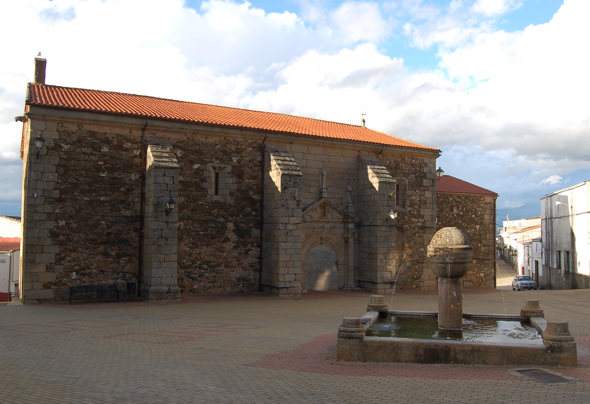 Iglesia de Santa Cruz de Paniagua